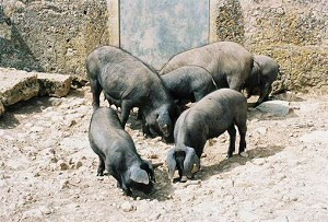 Porc negre5